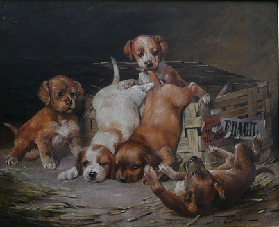 Cinco cachorros. óleo / lienzo. 50x61 cm.